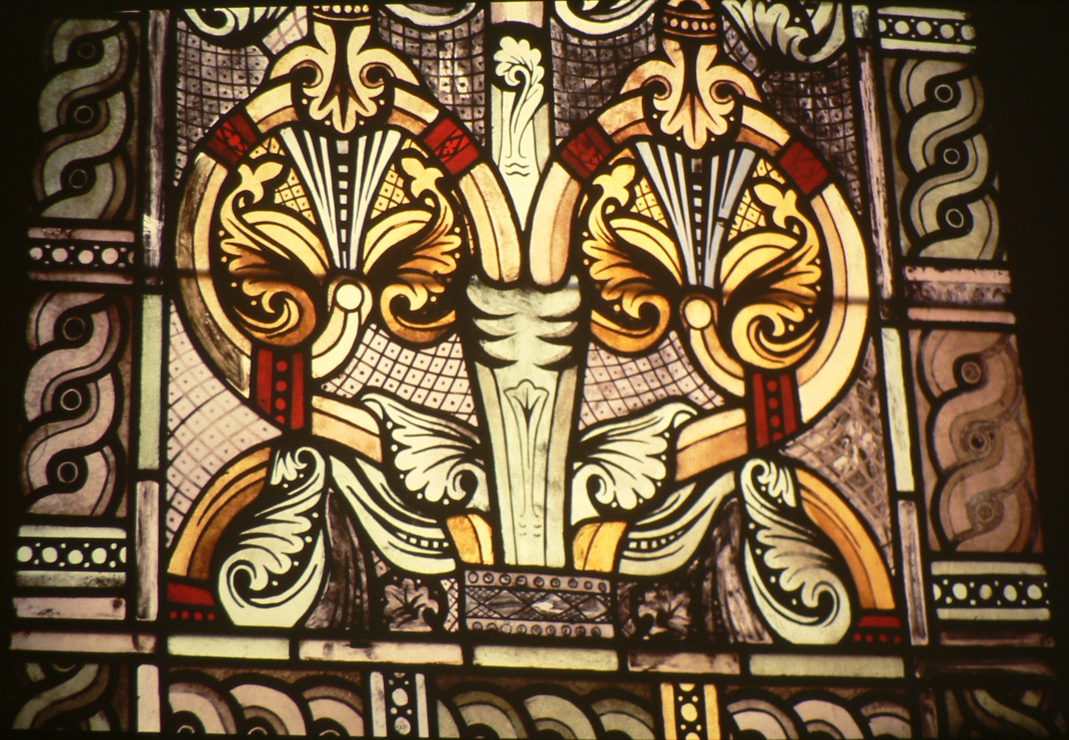 Kirchenfenster St. Petrus Gesmold